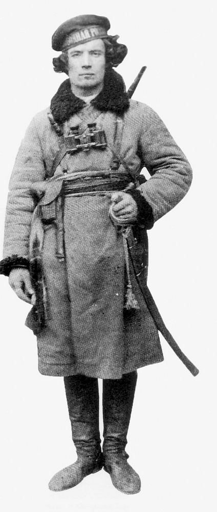 Федор Щусь (1893—1921)